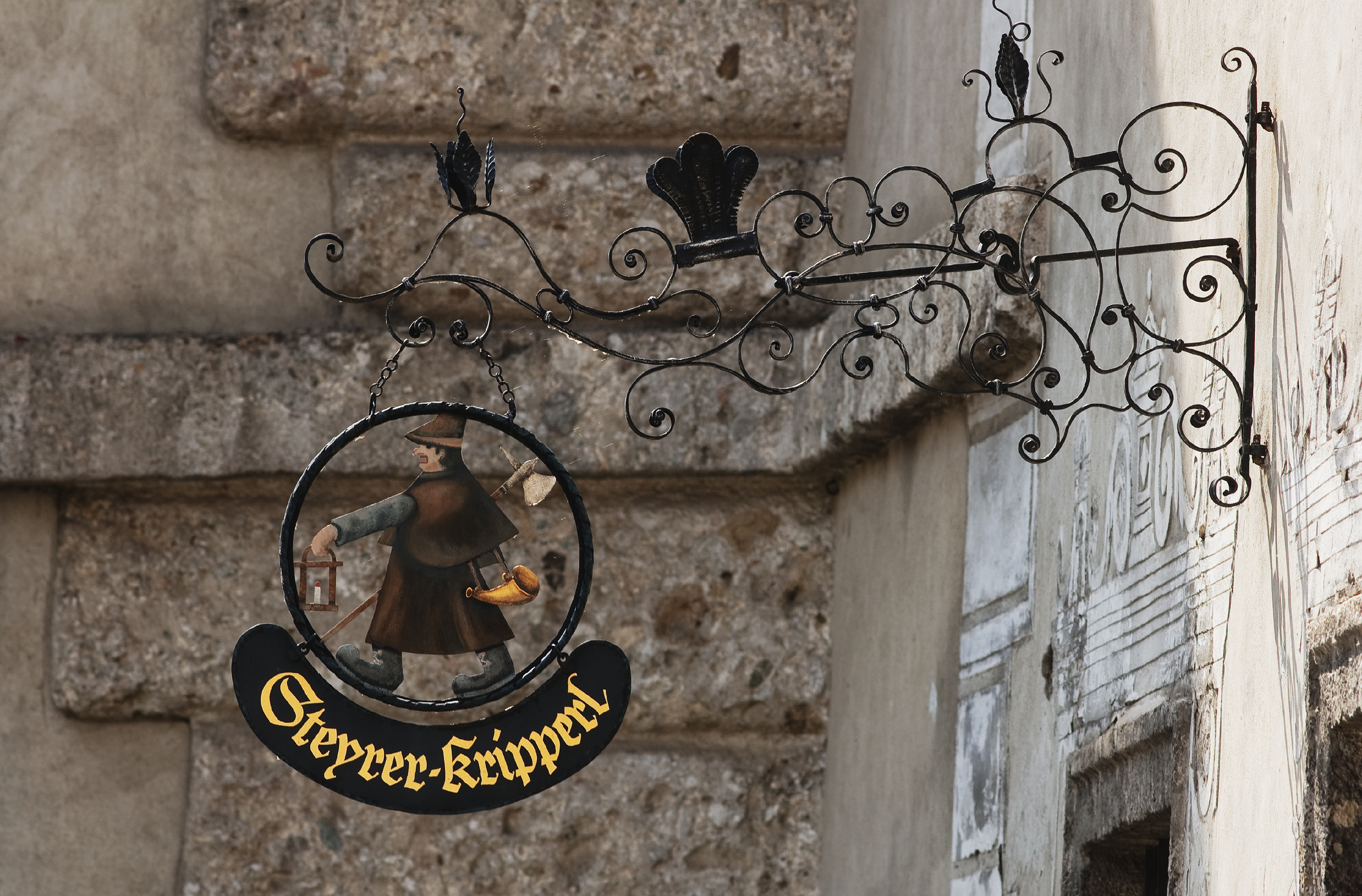 Das Hauszeichen „Steyrer Kripperl“ am Innerberger Stadel in Steyr.